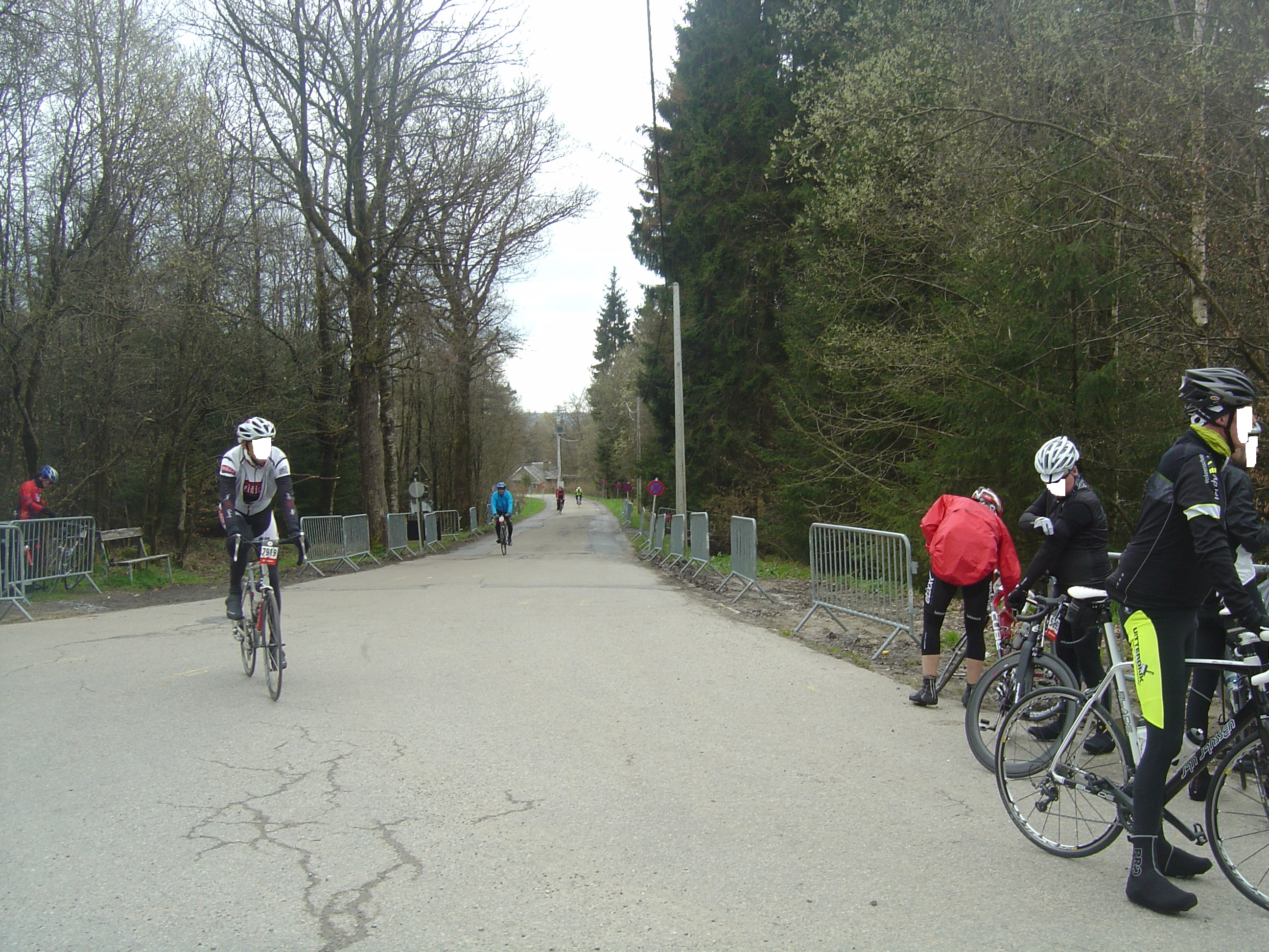 Passage au col du Rosier sur la randonnée cyclotouriste Liège-Bastogne-Liège Challenge 2016